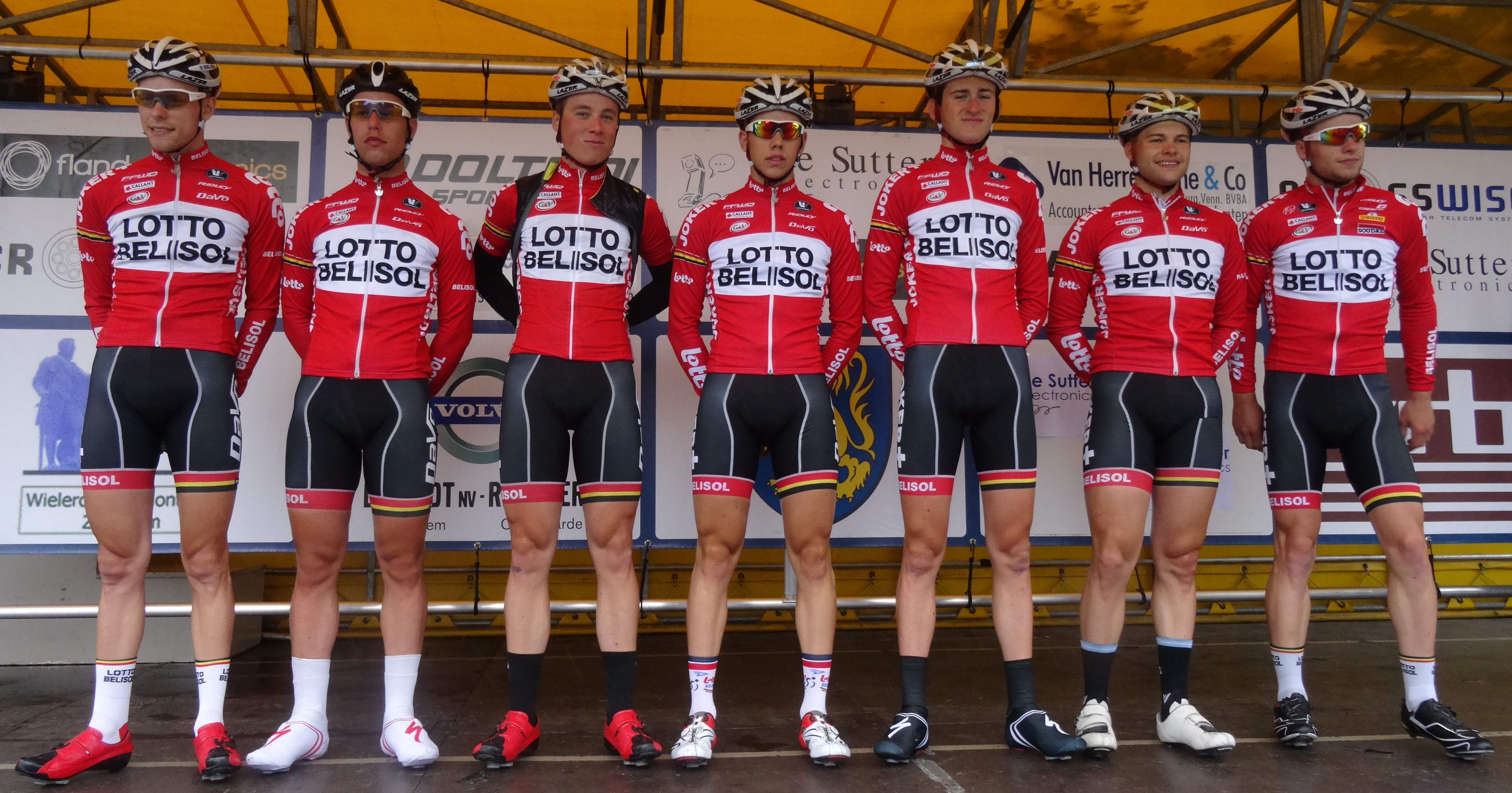 Reportage photographique réalisé le samedi 5 juillet à l'occasion du départ et de l'arrivée du Circuit Het Nieuwsblad espoirs 2014 à Grotenberge (Zottegem), Belgique.